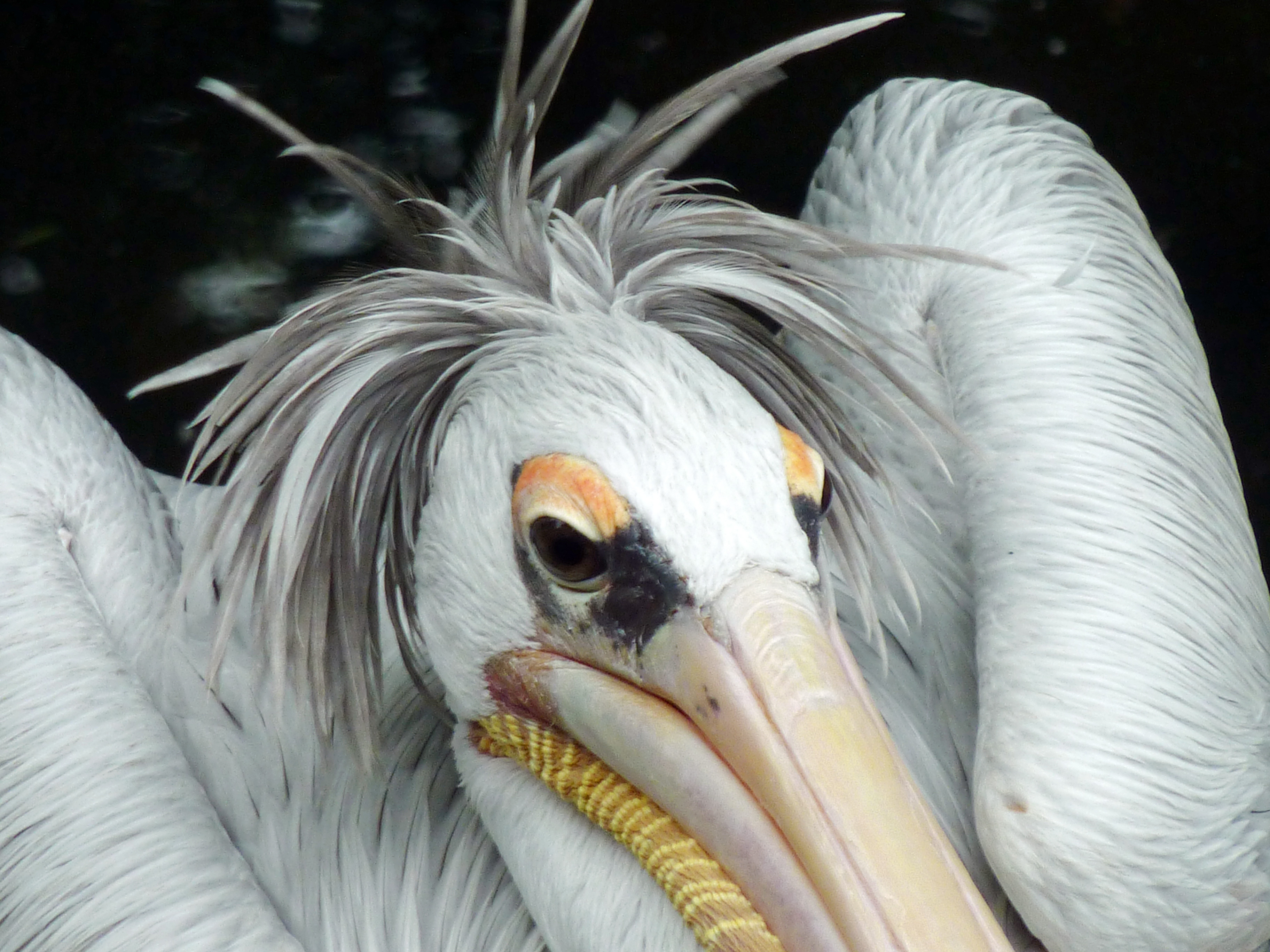 Kopf eines Rötelpelikans (Pelecanus rufescens) im Tierpark Berlin-Friedrichsfelde.